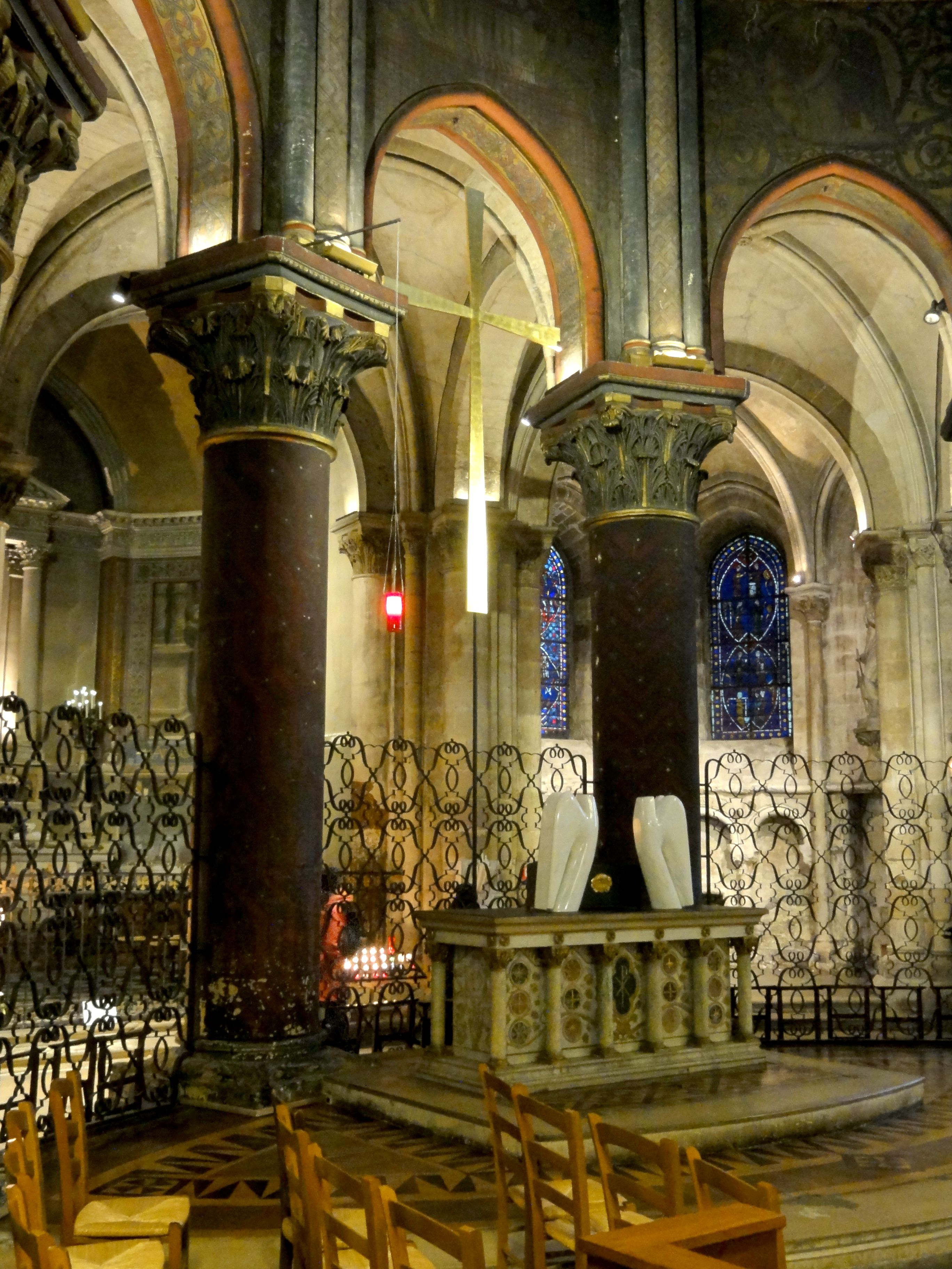 Chœur, autel du Saint-Sacrement.